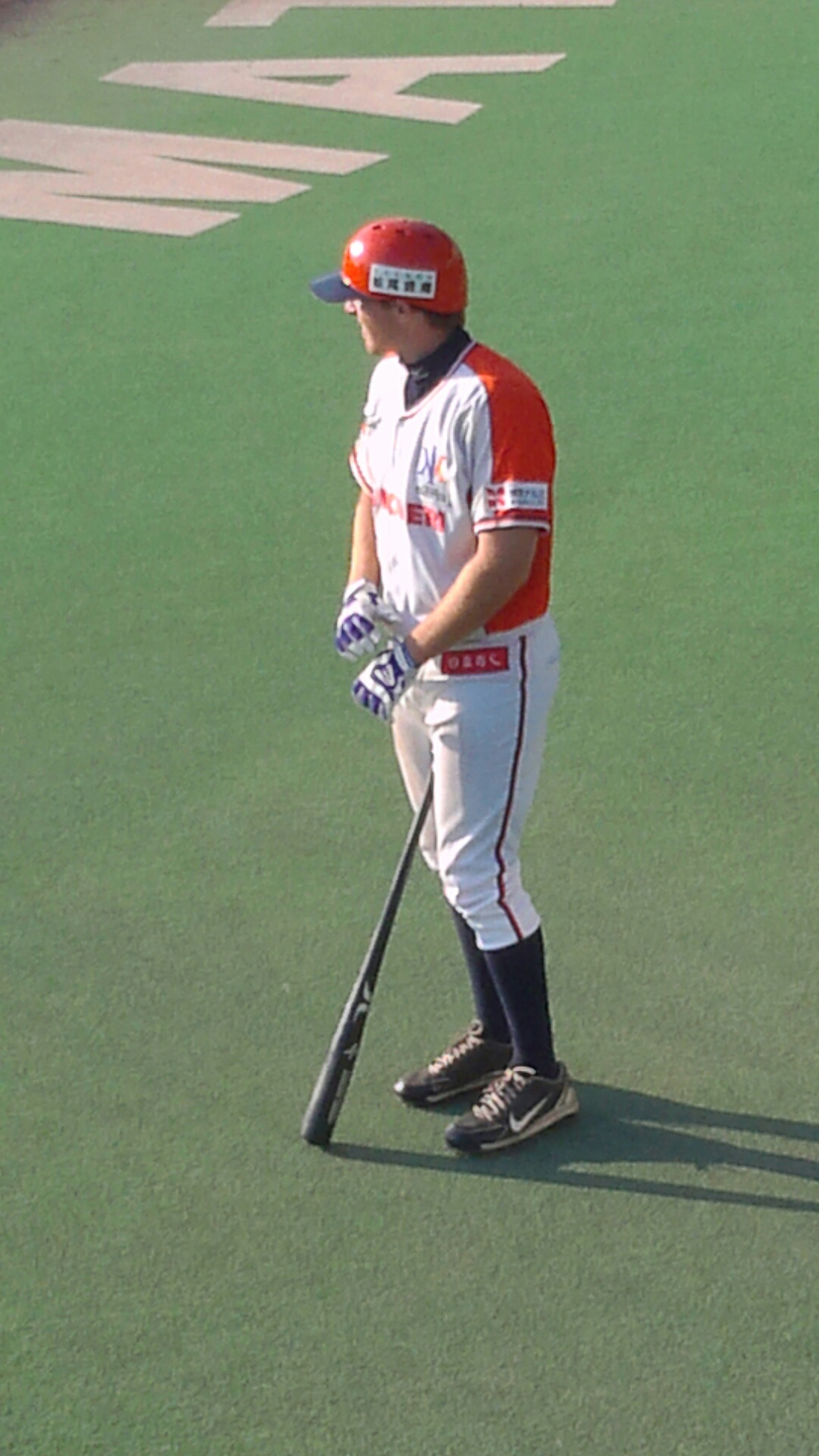 新潟アルビレックスBC時代のミッチェル・ジョン・デニング